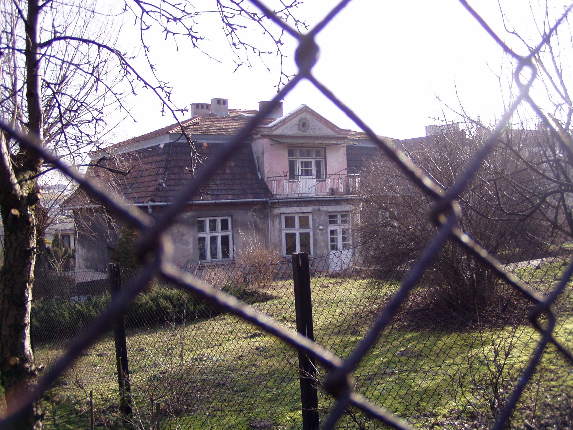 Vila Amona Goetha. Balkón.